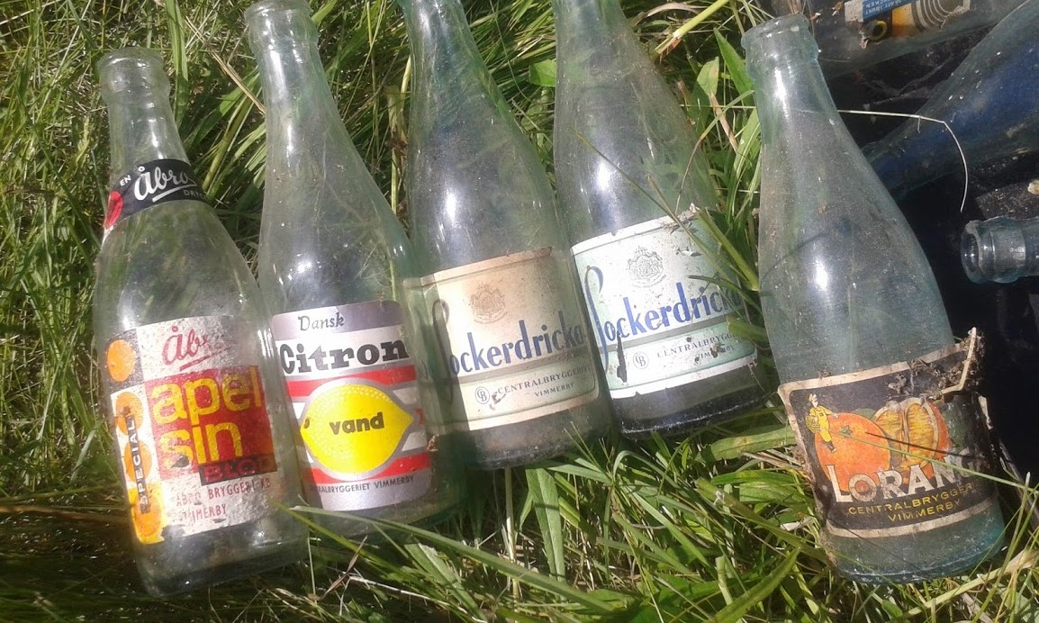 Tomflaskor med etiketter för Sockerdricka från Centralbryggeriet i Vimmerby, del av Centralbryggeriet AB, senare uppköpt av Pripps bryggerier. En av flaskorna är för Pripp.